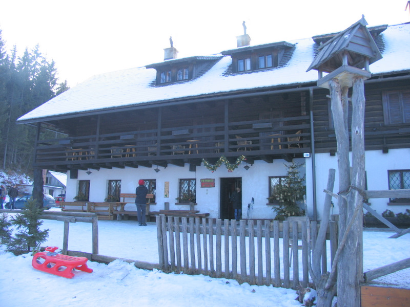 Partizanski dom na Vodiški planini